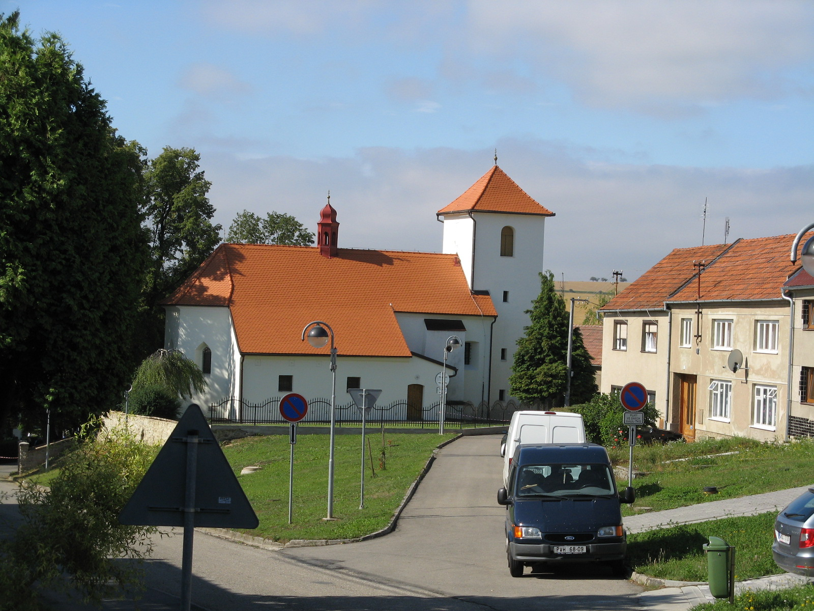 Kostel sv. Kunhuty (Vranovice), Vranovice